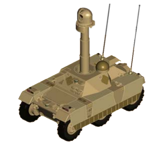 ARV-R Deferred Cpncept